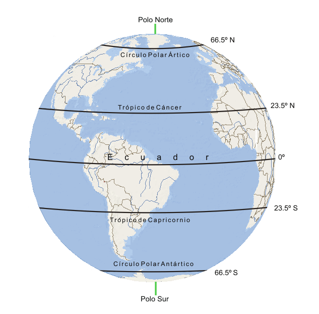 Diagrama del planeta Tierra señalando los paralelos notables (principales) y sus latitudes